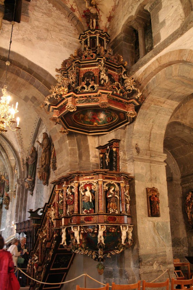 Interior from Mariakirken in Bergen